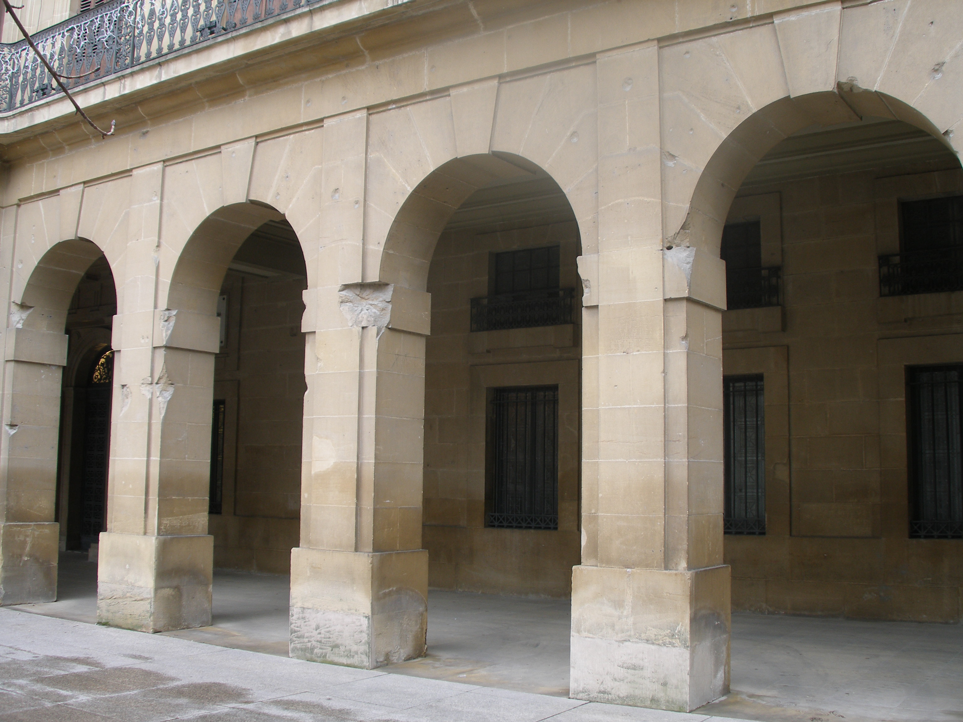 Nafarroako Jauregia, arkupeak